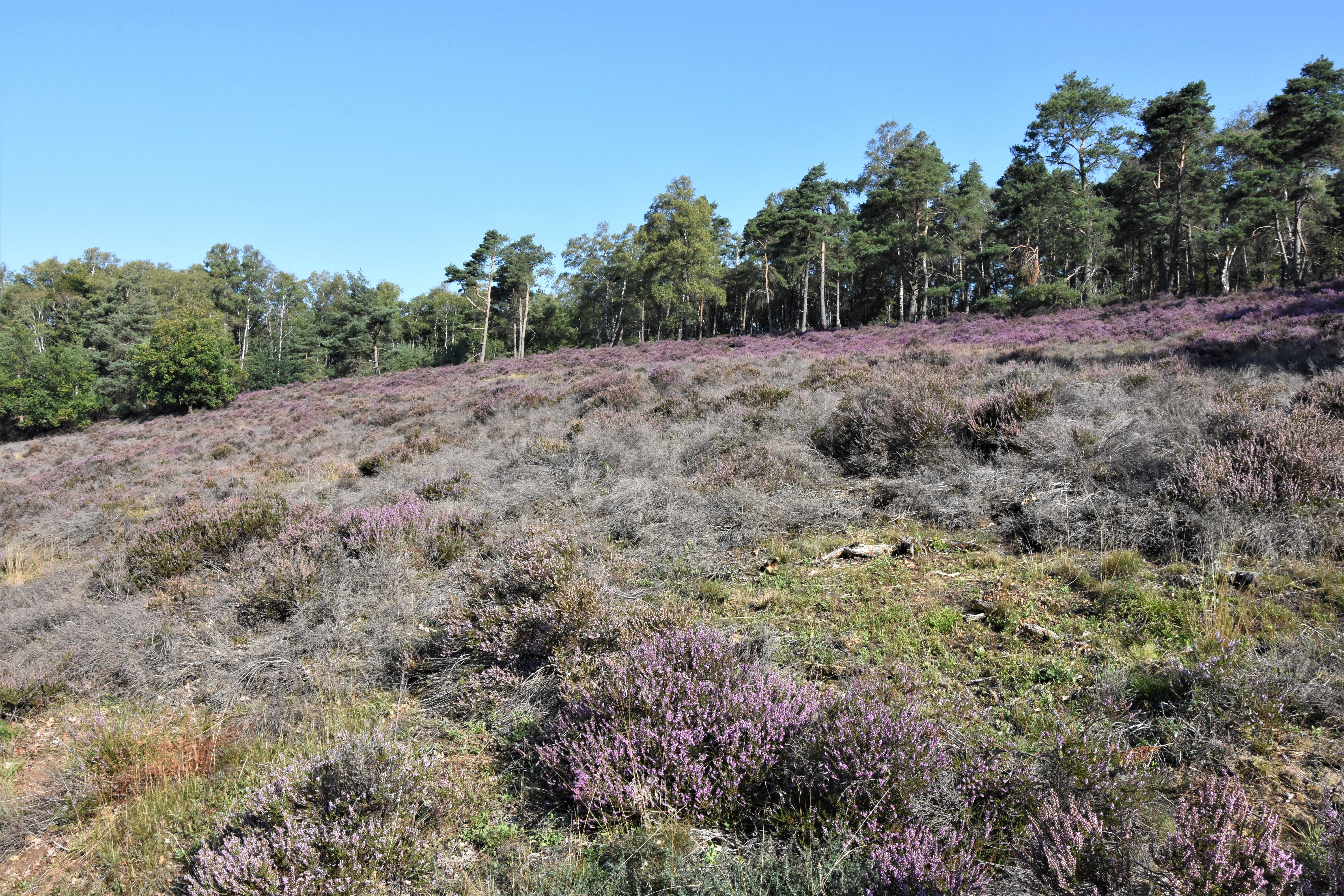 Heide am Gehn in Bramsche